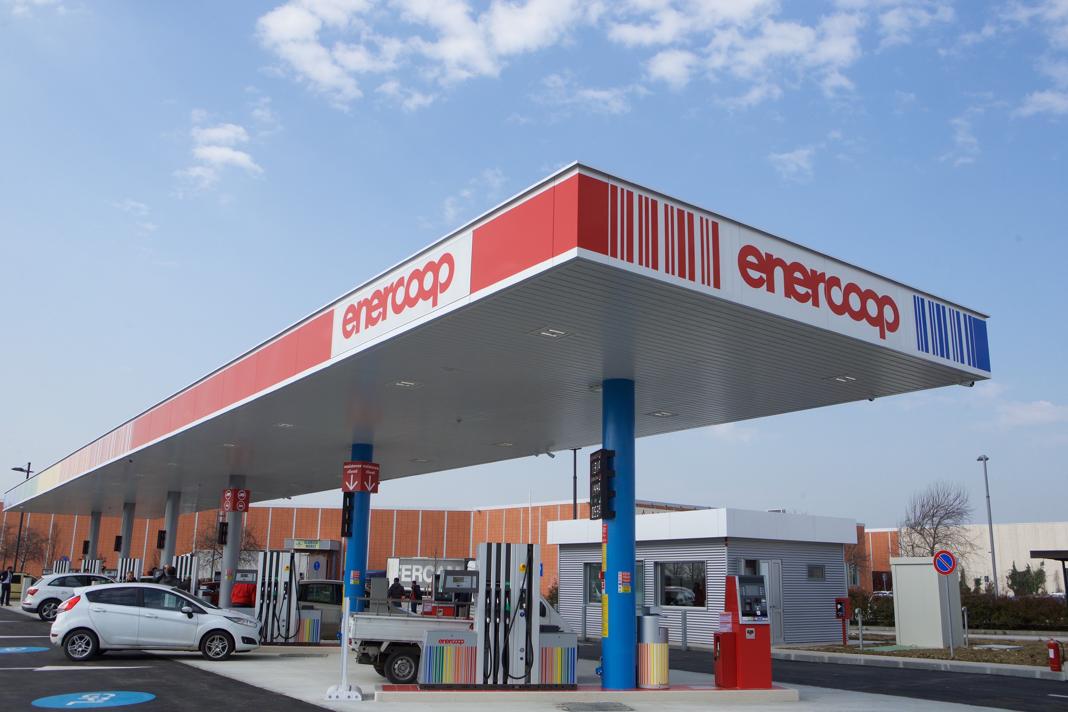 Distributore EnerCoop Italia presso l'IperCoop di Faenza (RA)